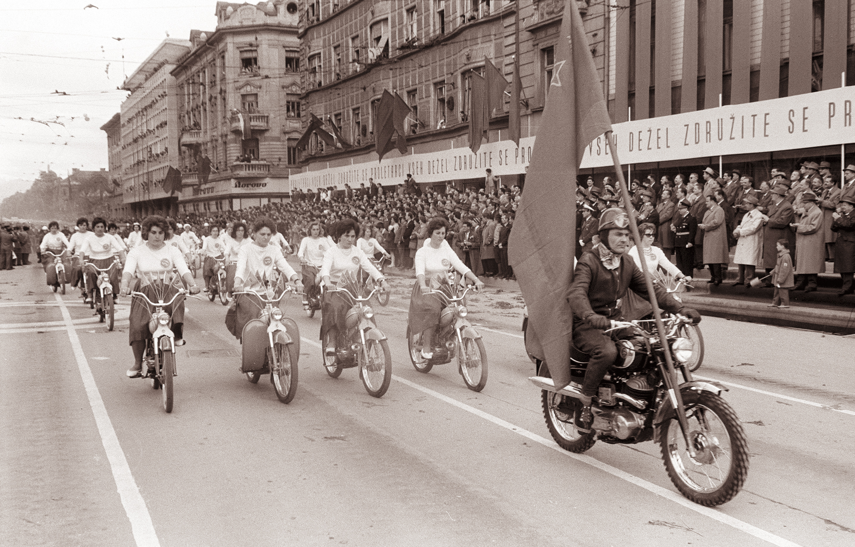 Prvomajski sprevod v Ljubljani